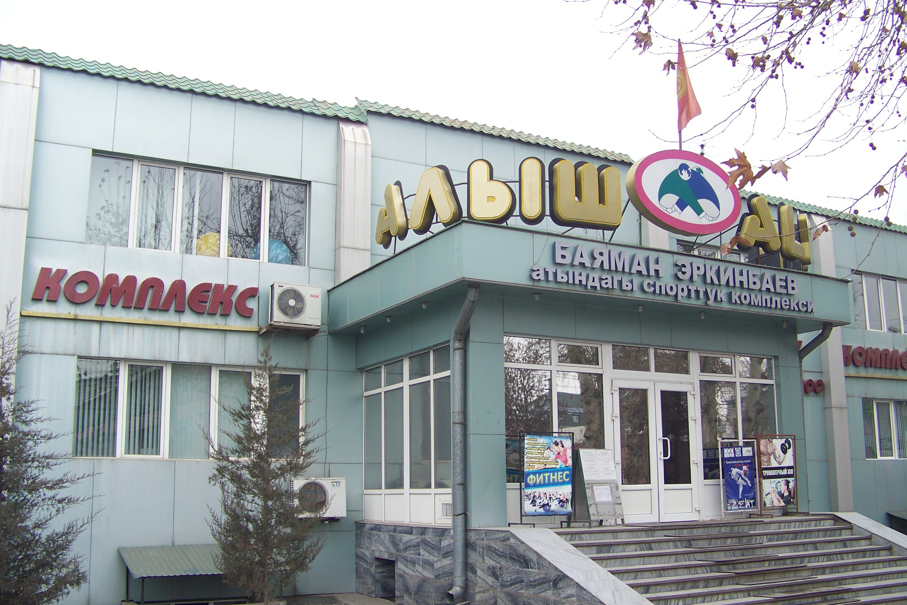 Спортивный комплекс "Алыш" в г. Ош (Кыргызстан)